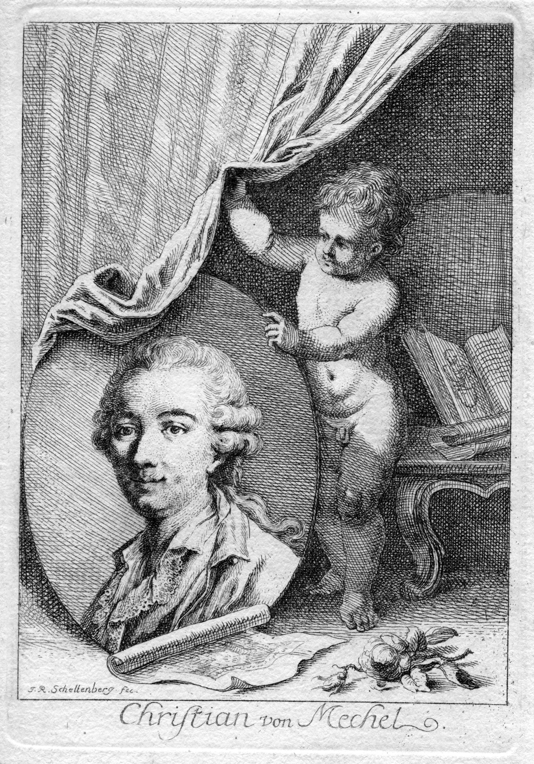 Portrait des schweizerischen Kupferstechers Christian von Mechel.